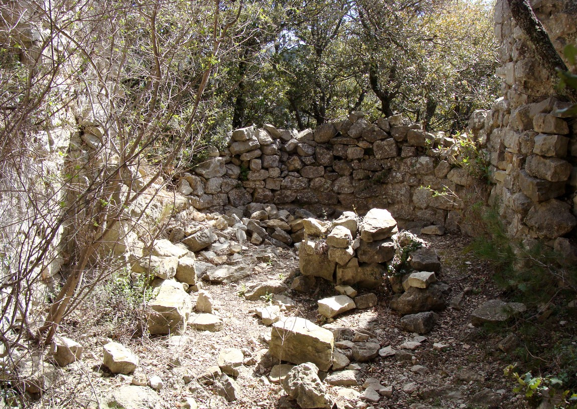 Un mur ruiné de forme semi-circulaire, probablement abside d'une chapelle.